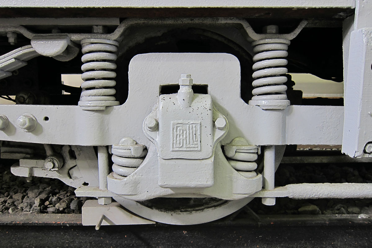 Brill 21E台車、軸箱の「Brill」の陽刻。横浜市電保存館の保存車。